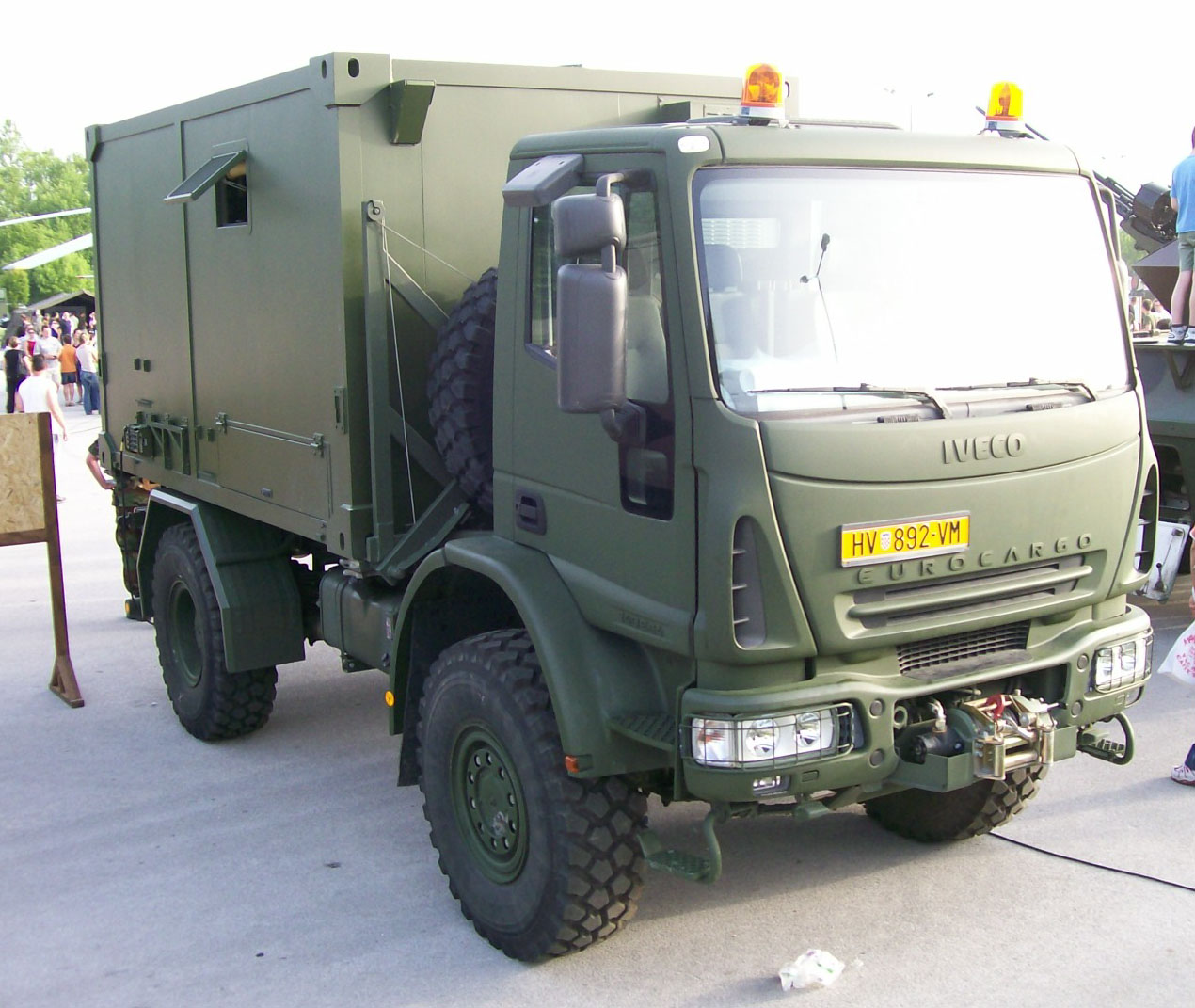 Kamion Iveco Eurocargo - Pukovnija veza